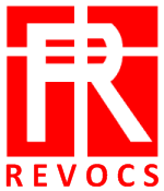 Logo della Revocs Corporation nell'anime Kill la Kill